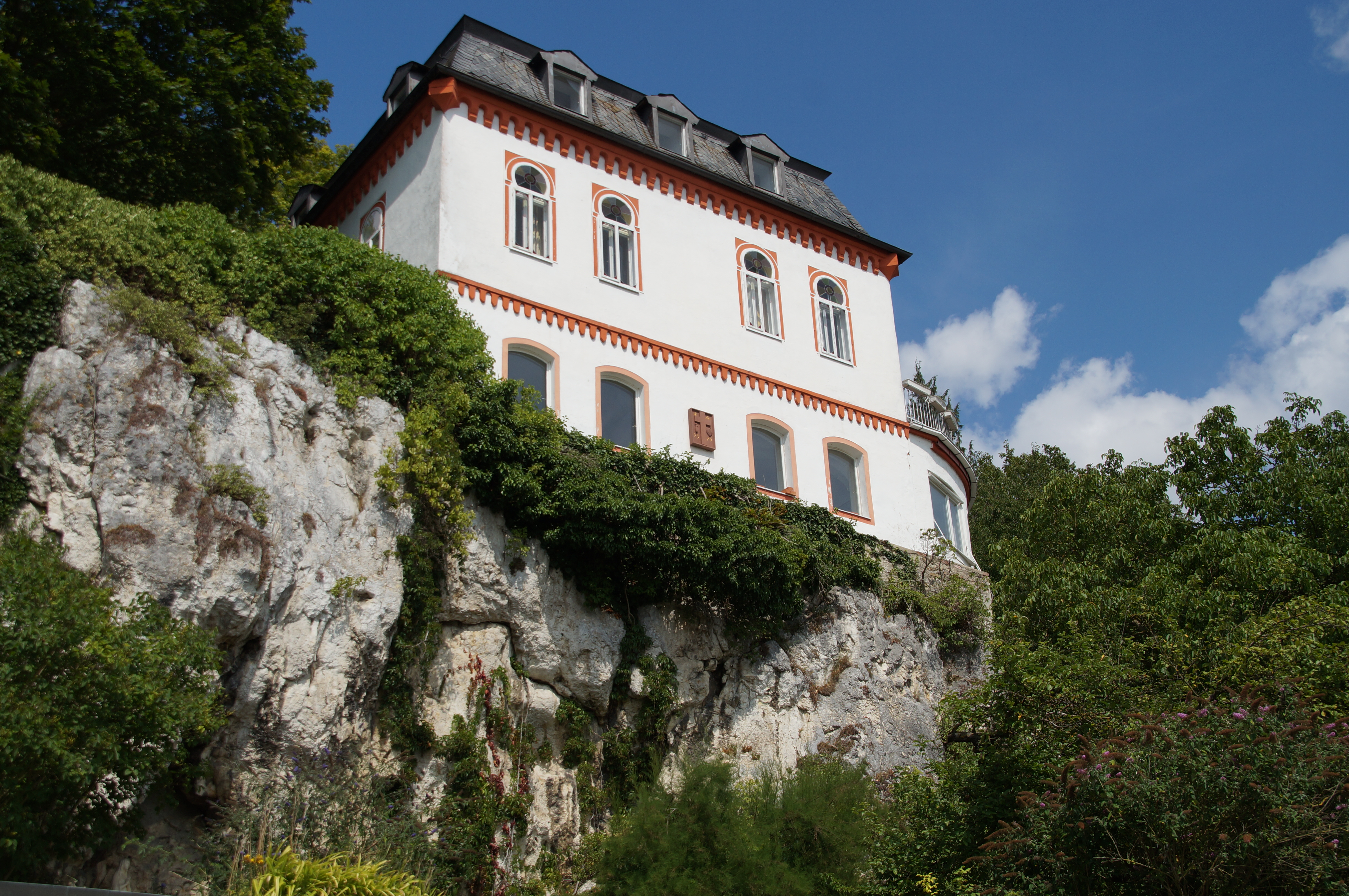 Felshang an den Winzerer Höhen, Regensburg, Geotop-Nr.: 362R005